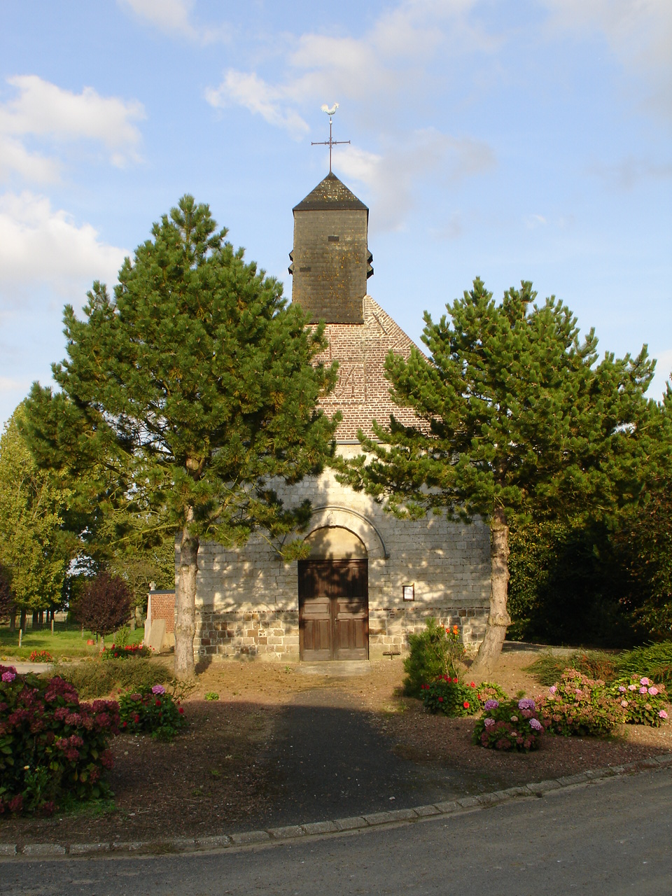 Église de Sars-le-Bois